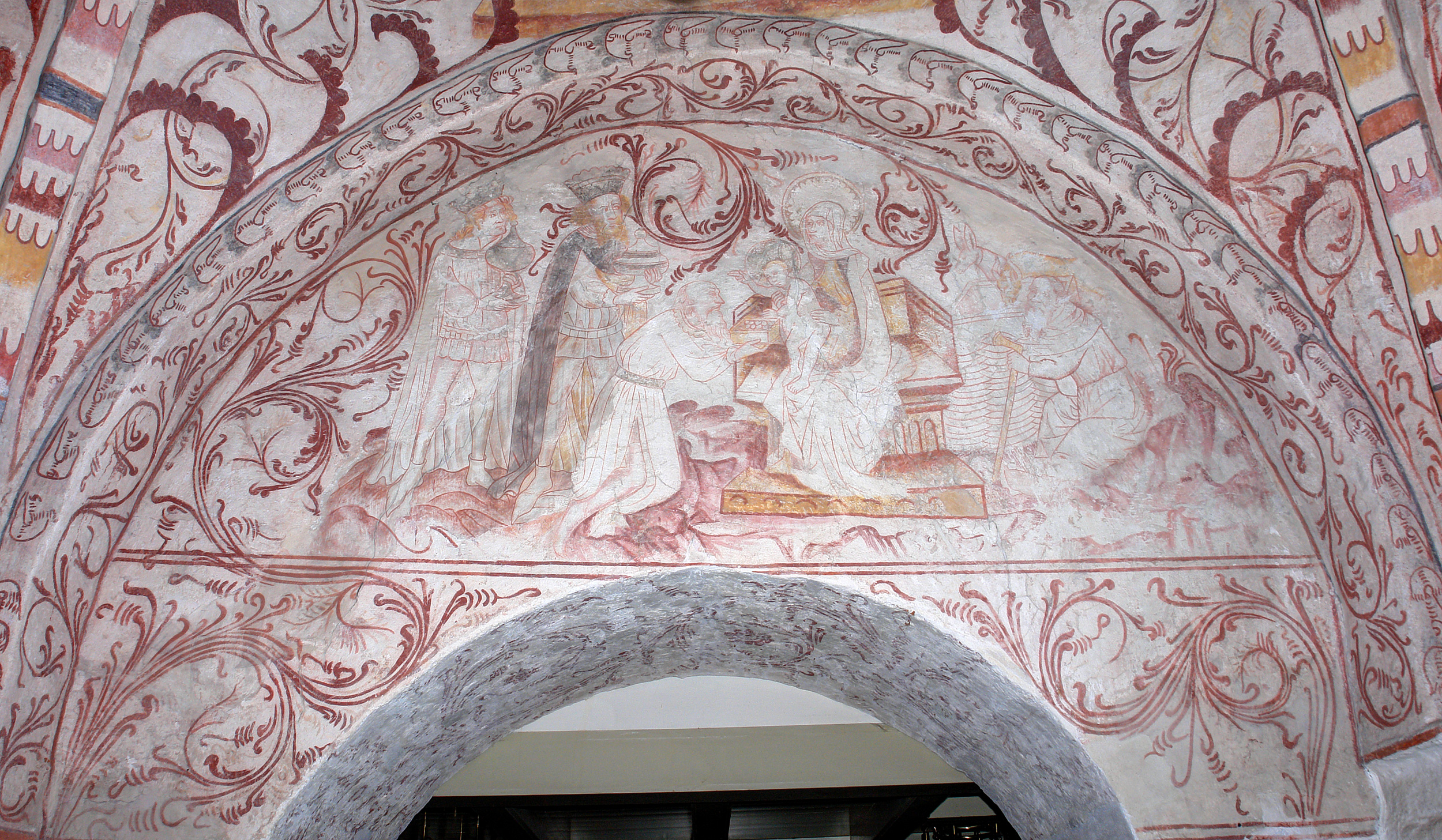 Kirche von Nødebo, Dänemark (Nord-Seeland). Fresken im Turm aus der Mitte des 15. Jahrhunderts vom renommierten Undløse-Meister: Anbetung der Könige